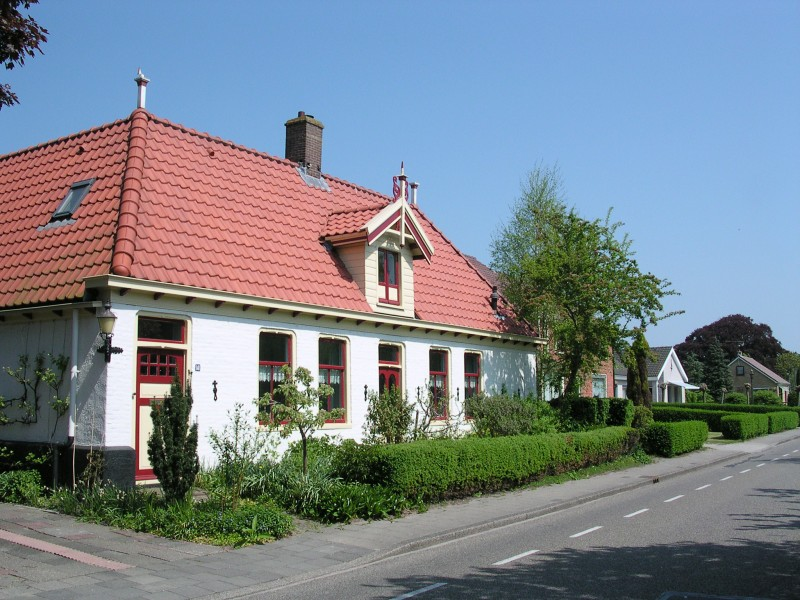 Het dorp Blokker (Westerblokker). The village of Blokker.